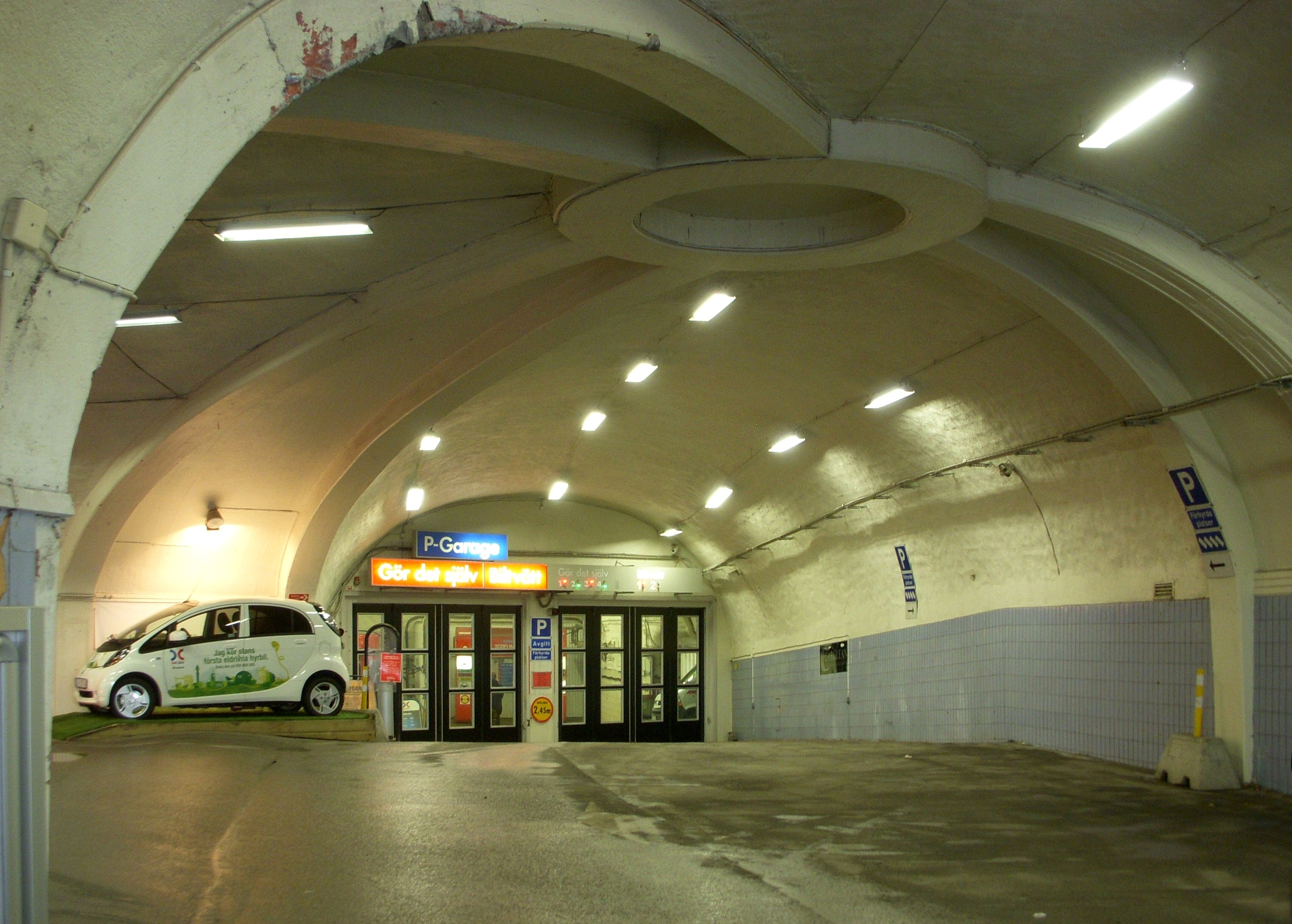 Infart till Katarinagaraget i Stockholm